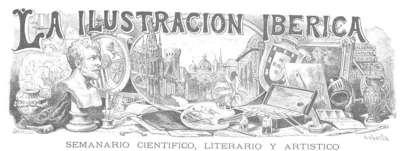 Logotip de la revista La Ilustración Ibérica només per al num.64 del setmanari (Barcelona, 22 de març de 1884)